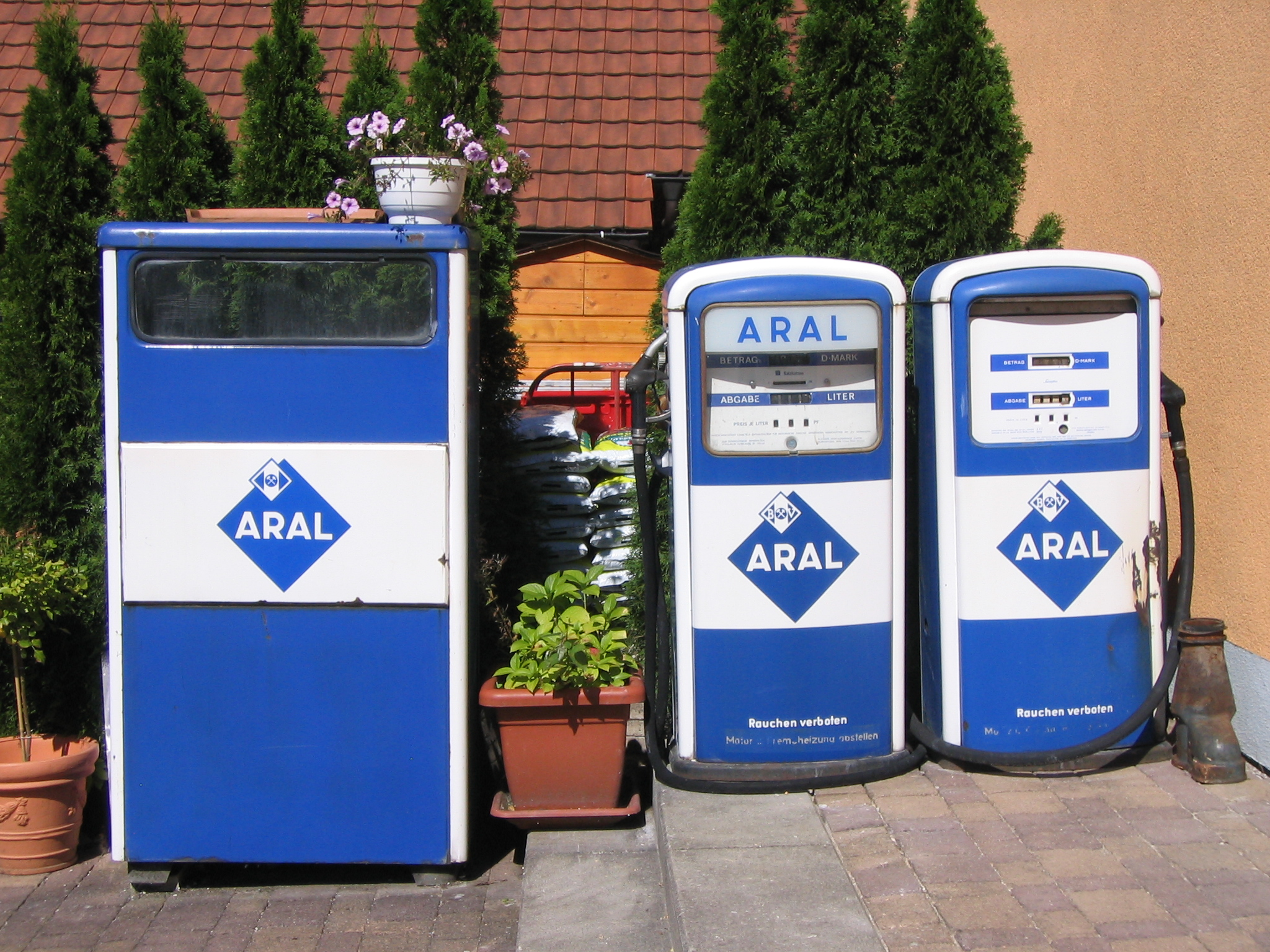 Aral-Zapfsäulen in Buchenbach